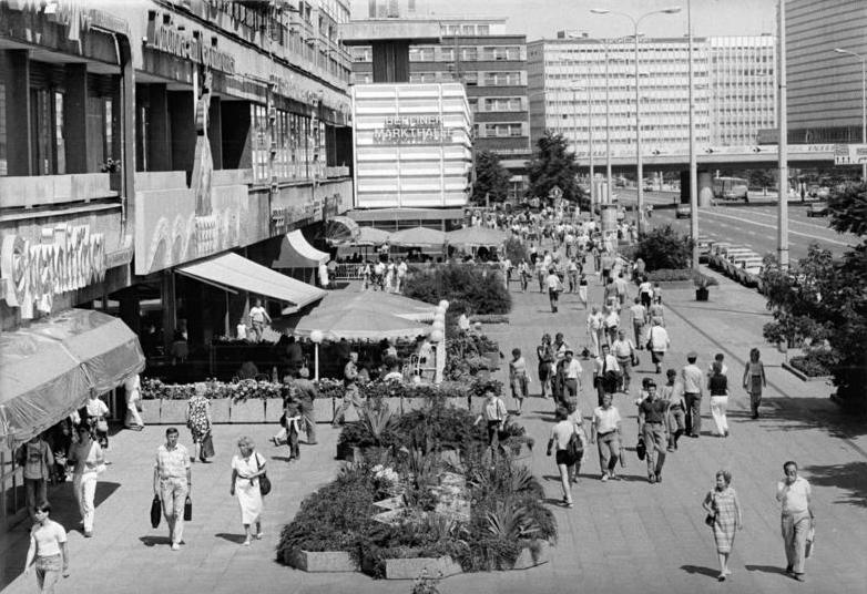 Berlin, Karl-Liebknecht-Straße ADN-ZB Grimm 12.7.88 Berlin: Die Karl-Liebknecht-Straße - eine bei Touristen und Berlinern gleichermaßen beliebte Geschäftsstraße im Zentrum der Stadt.